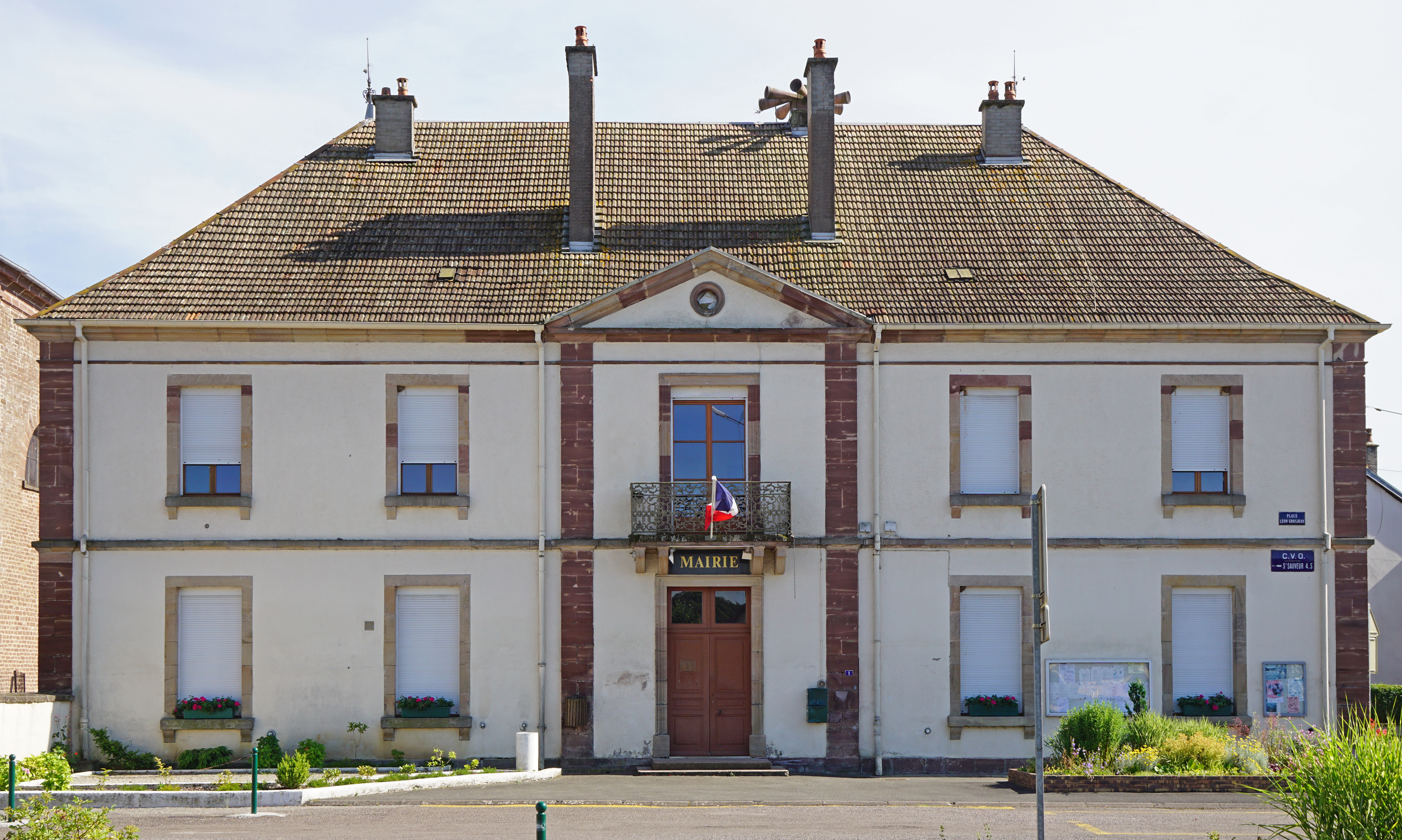 La mairie de Breuches.